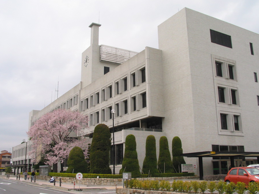 Kuwana cityhall 桑名市役所 三重県桑名市中央町で撮影